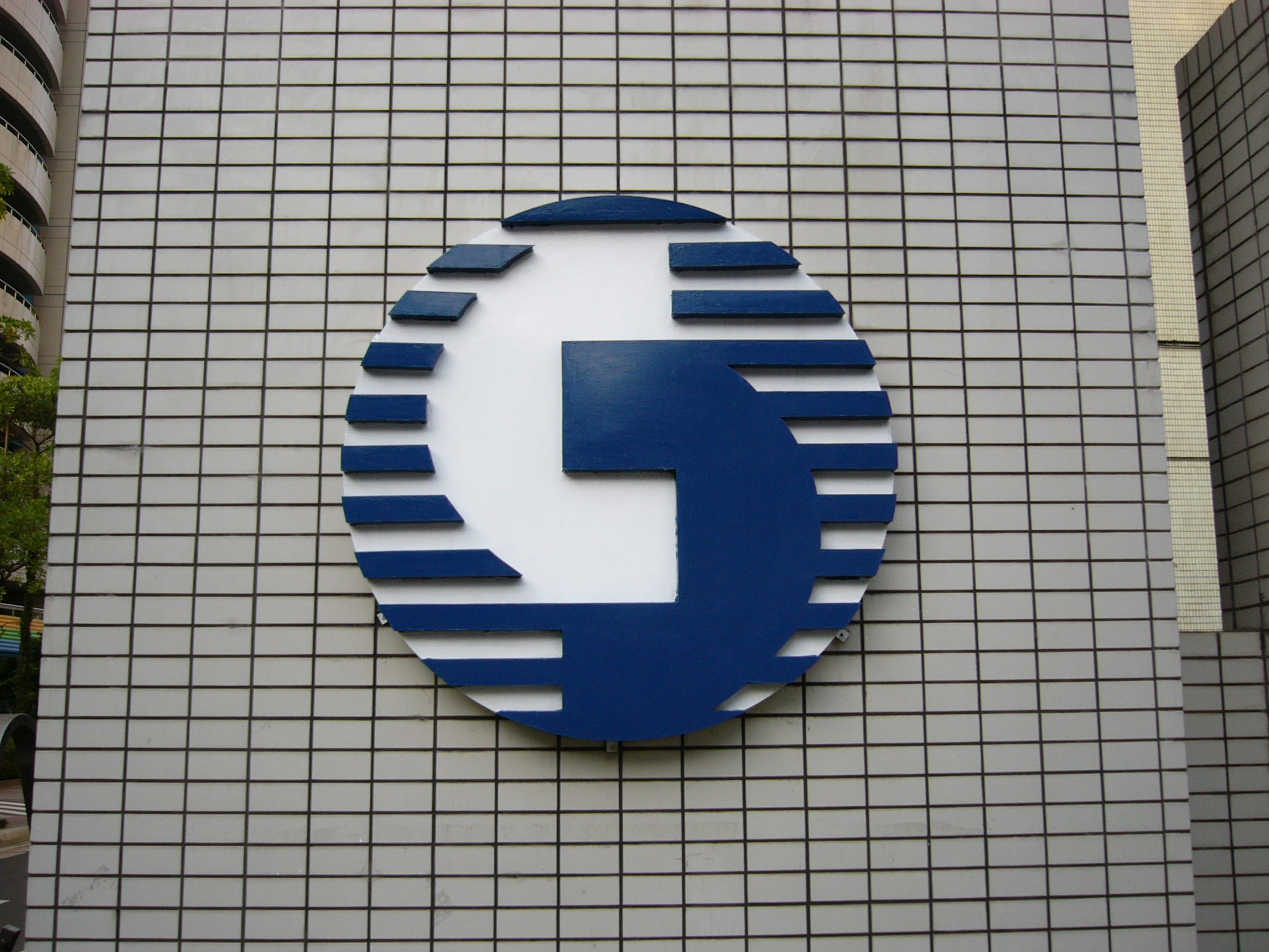 中華電信總部園區大門外牆上的中華電信第一代商標